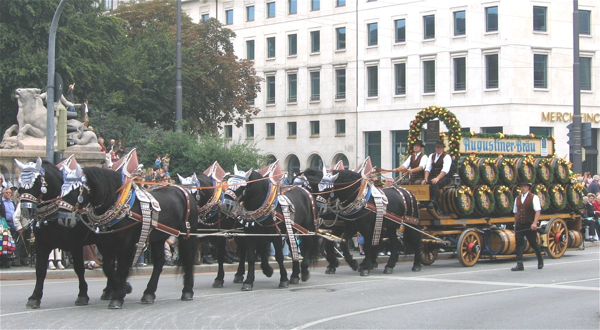 Oktoberfest, Brauereiwagen der Augustinerbrauerei